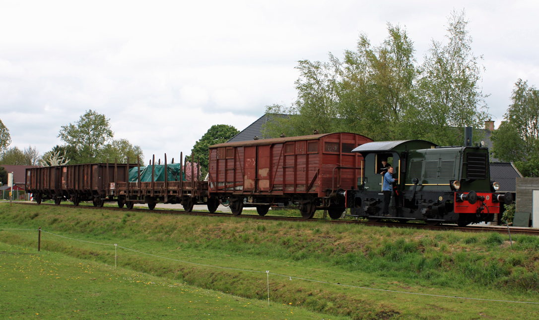 ex. NS locomotor 204 STAR met G-trein te Stadskanaal